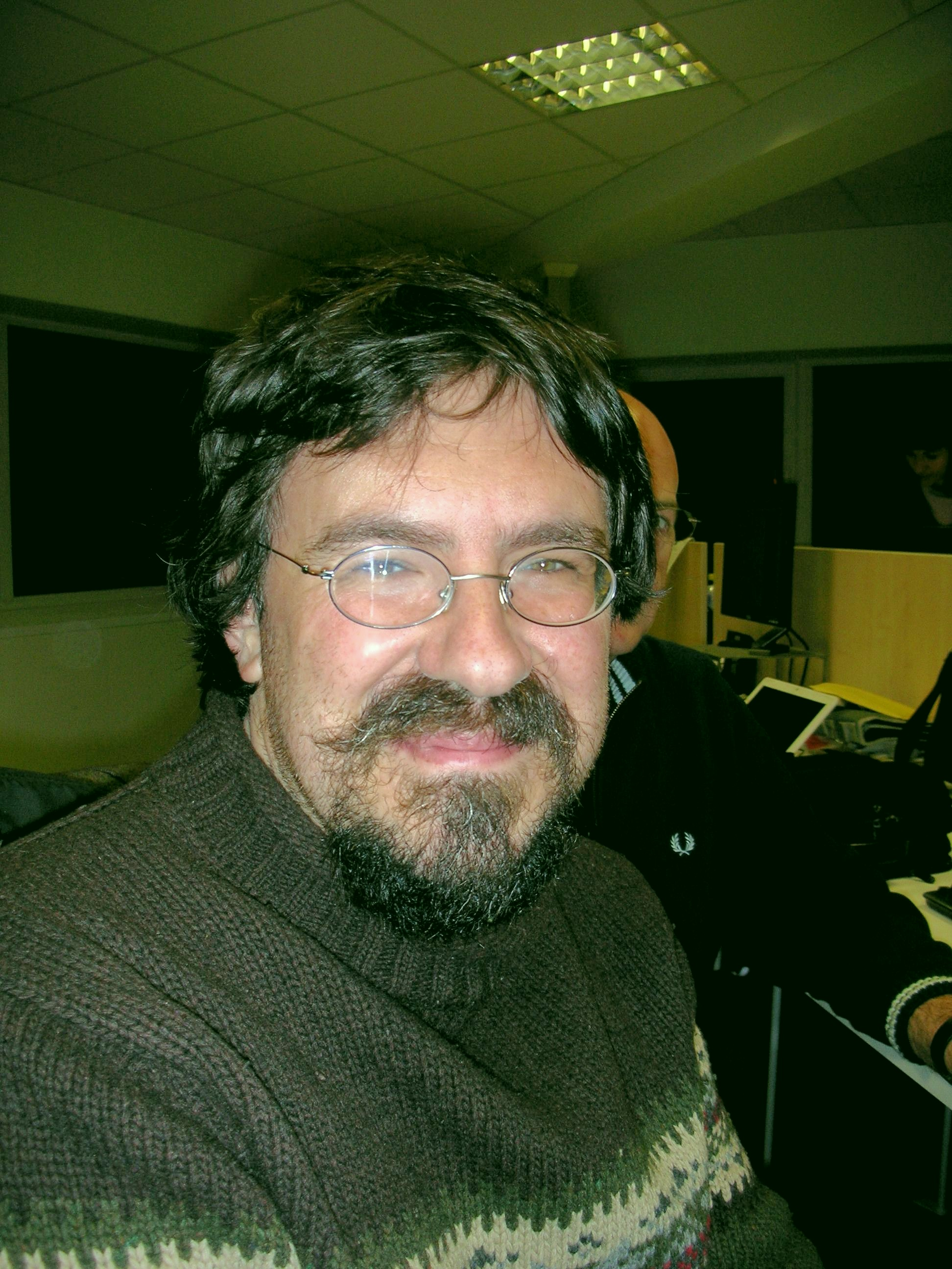 Iban Zaldua idazle eta historialaria 2008an